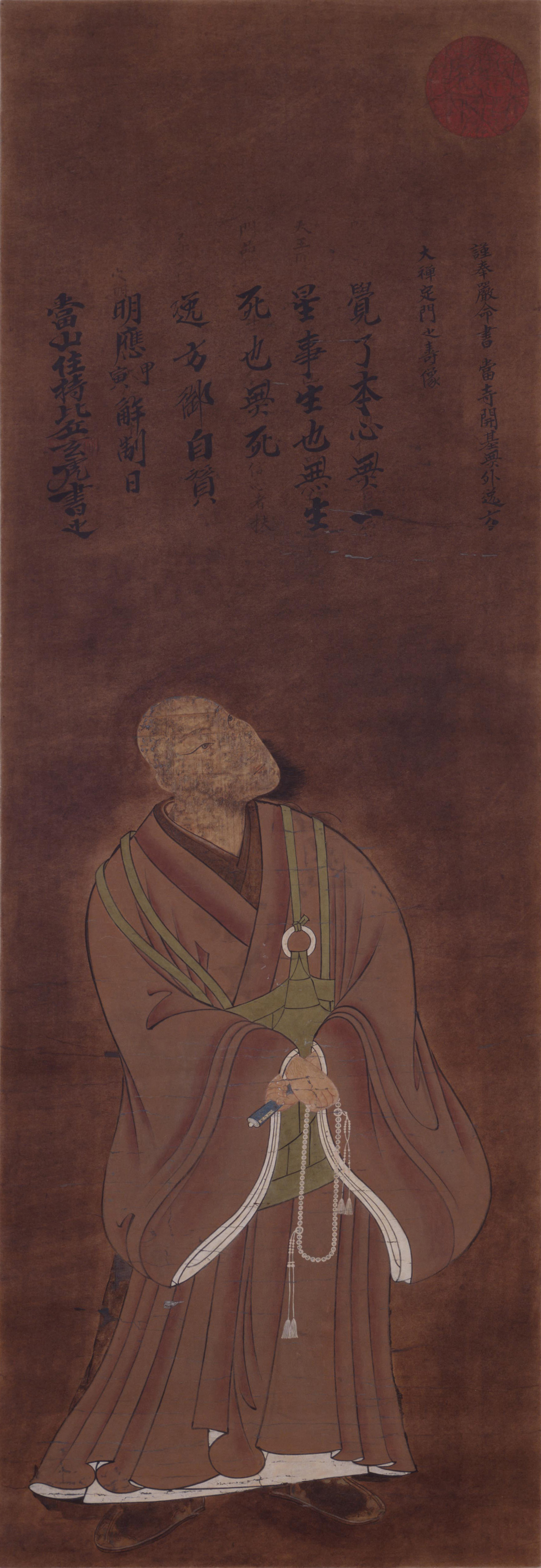 北畠政郷の肖像。